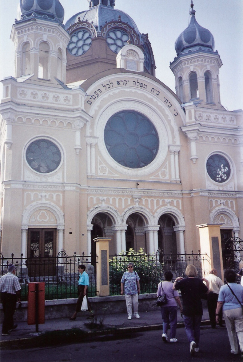 Synagogue in Târgu Mureş, Romania